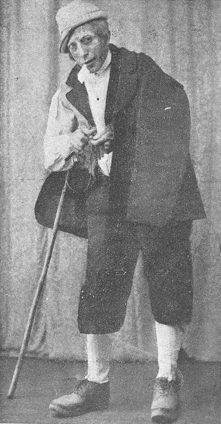 Xosé Mosquera Pérez caracterizado como O Vello dos Contos, fotografía en Vida Gallega 1933